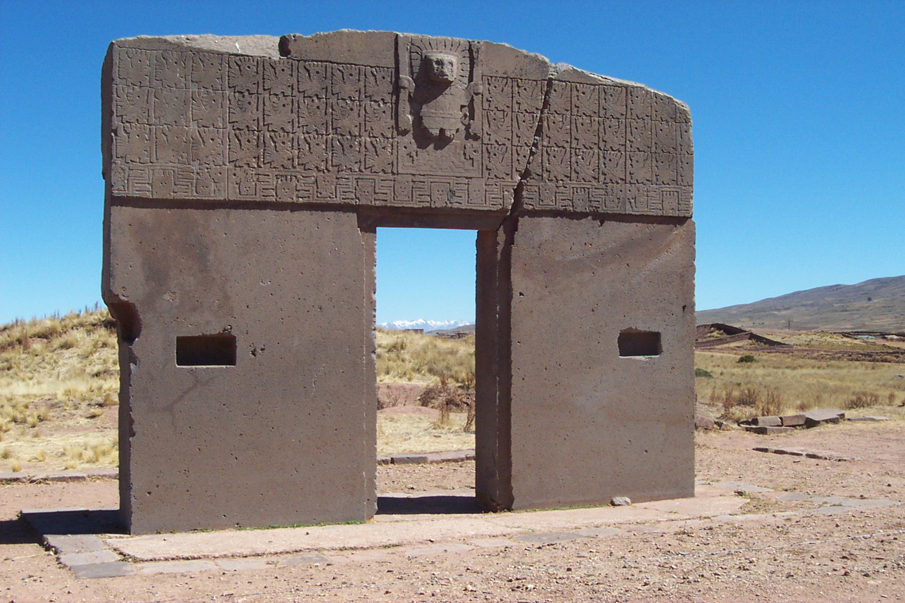 Sonnentor von Tiahuanaco in Bolivien